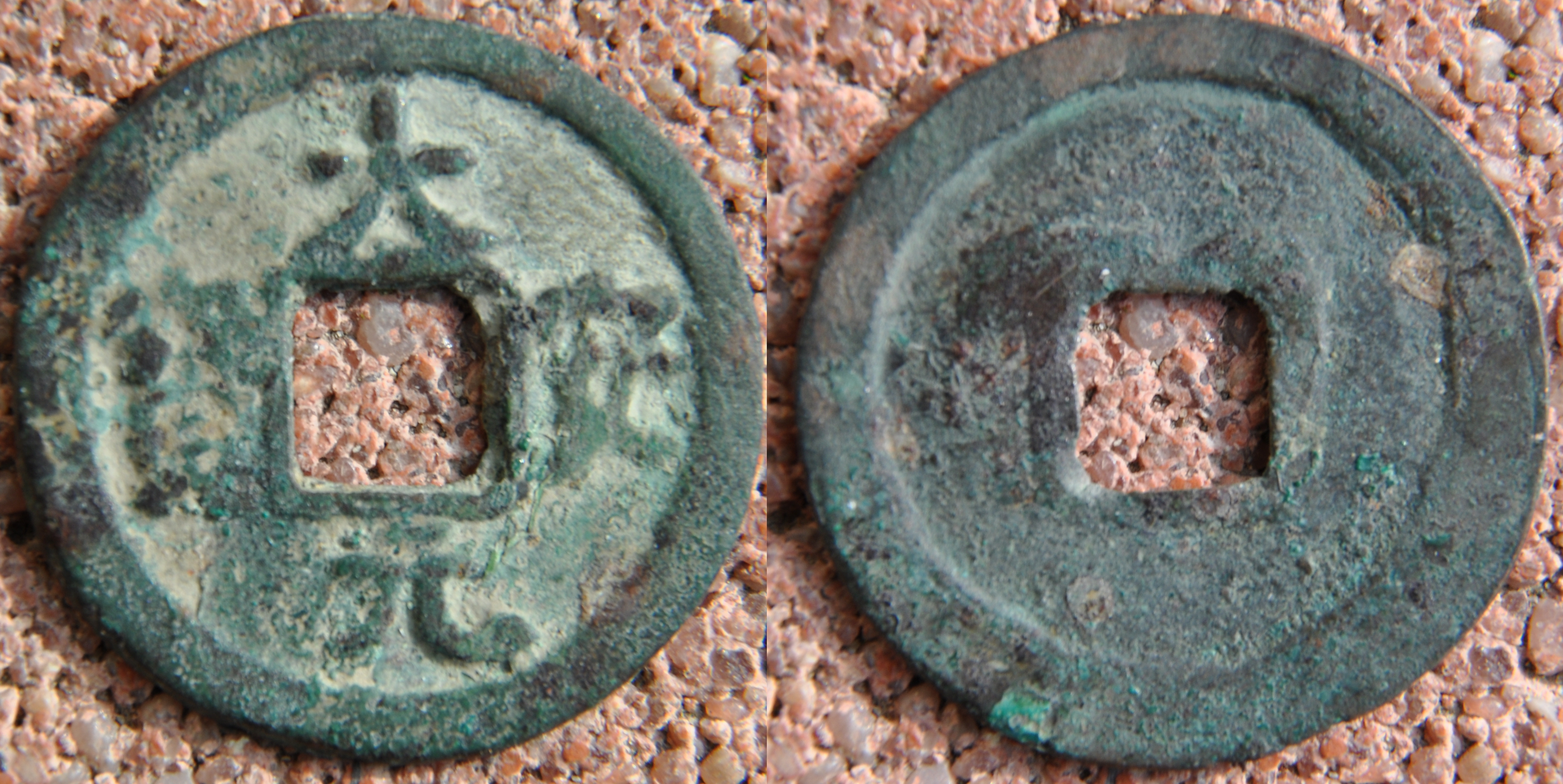 Une sapèque de valeur 1, dynastie Liao, empereur Dao Zong, ére Da An, 1085 à 1094. Chine monnaie Liao Monnaies de la dynastie Liao (907-1125)